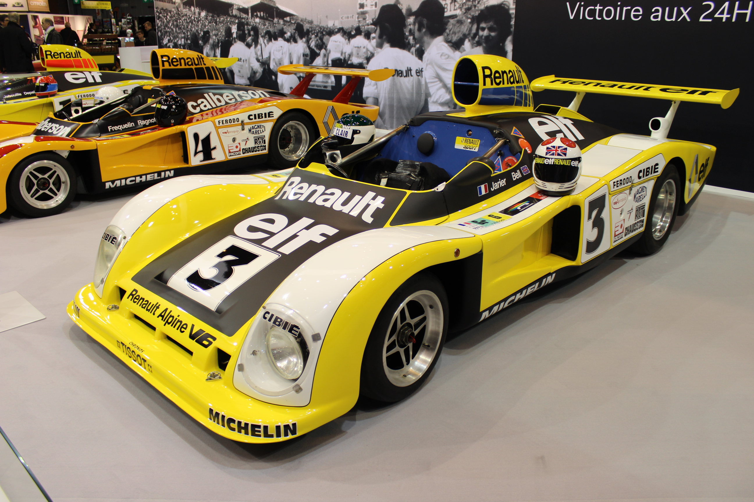 Rétromobile 2018 - 120 ans de Renault